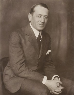 Der deutsche Schauspieler Eugen Burg